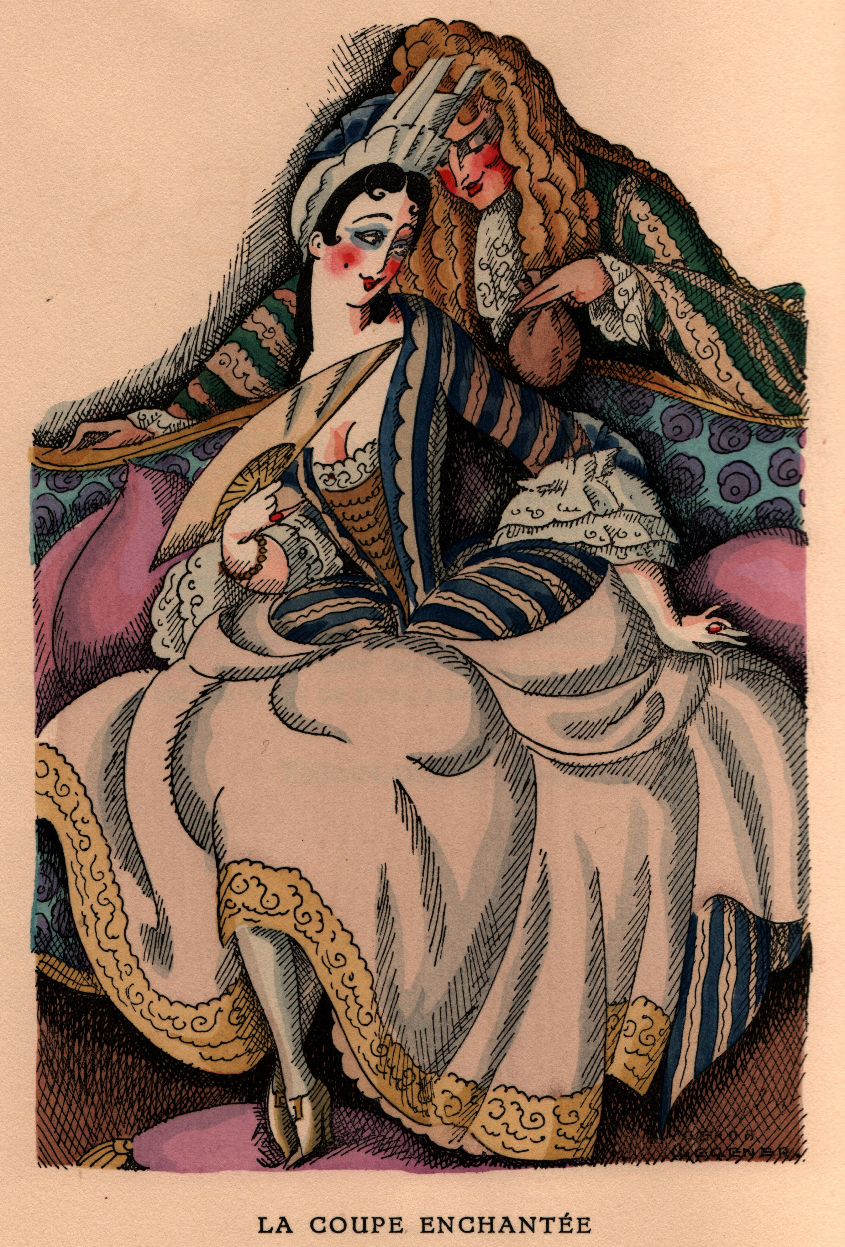 Frontispice des "Contes de La Fontaine", tome I, édition établie par Louis Perceau Le Livre du bibliophile, Georges Briffaut éditeur, 1928.